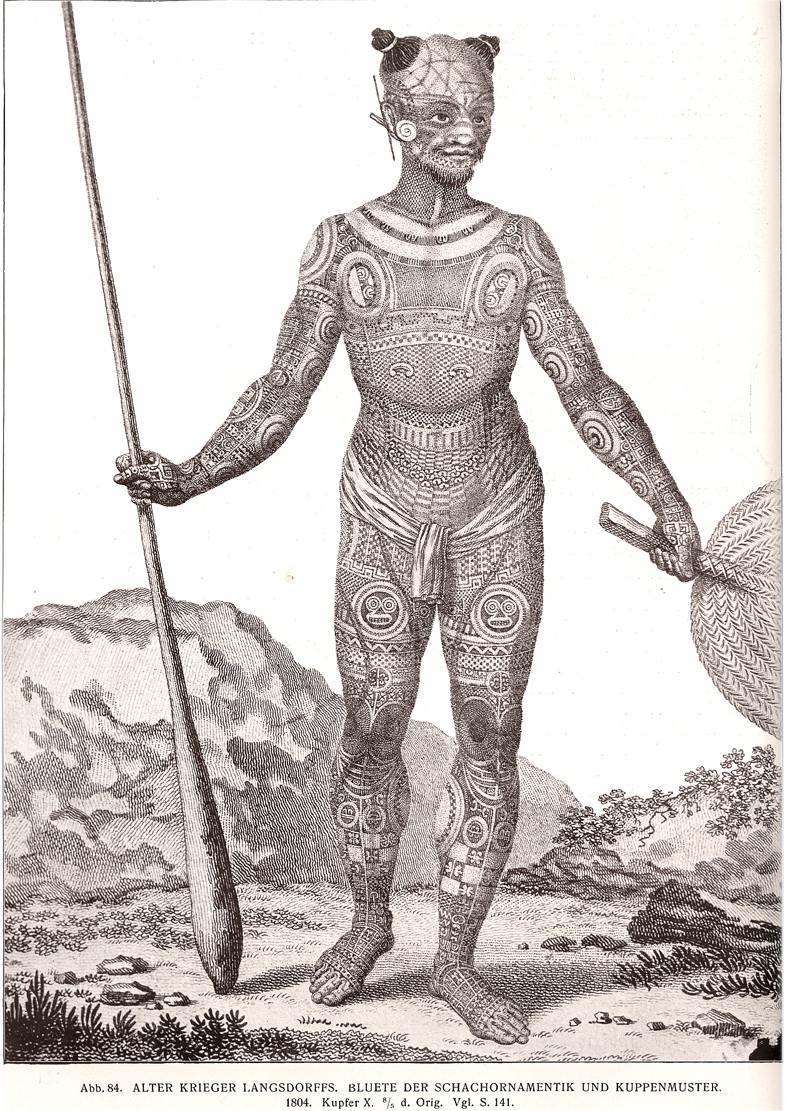 Tätowierter Krieger der Marquesas Inseln. Bildunterschrift: Abb.84. ALTER KRIEGER LANGSDORFFS. BLUETE DER SCHACHORNAMENTIK UND KUPPENMUSTER. 1804. Kupfer X. 8/5 d. Orig. Vgl.S.141